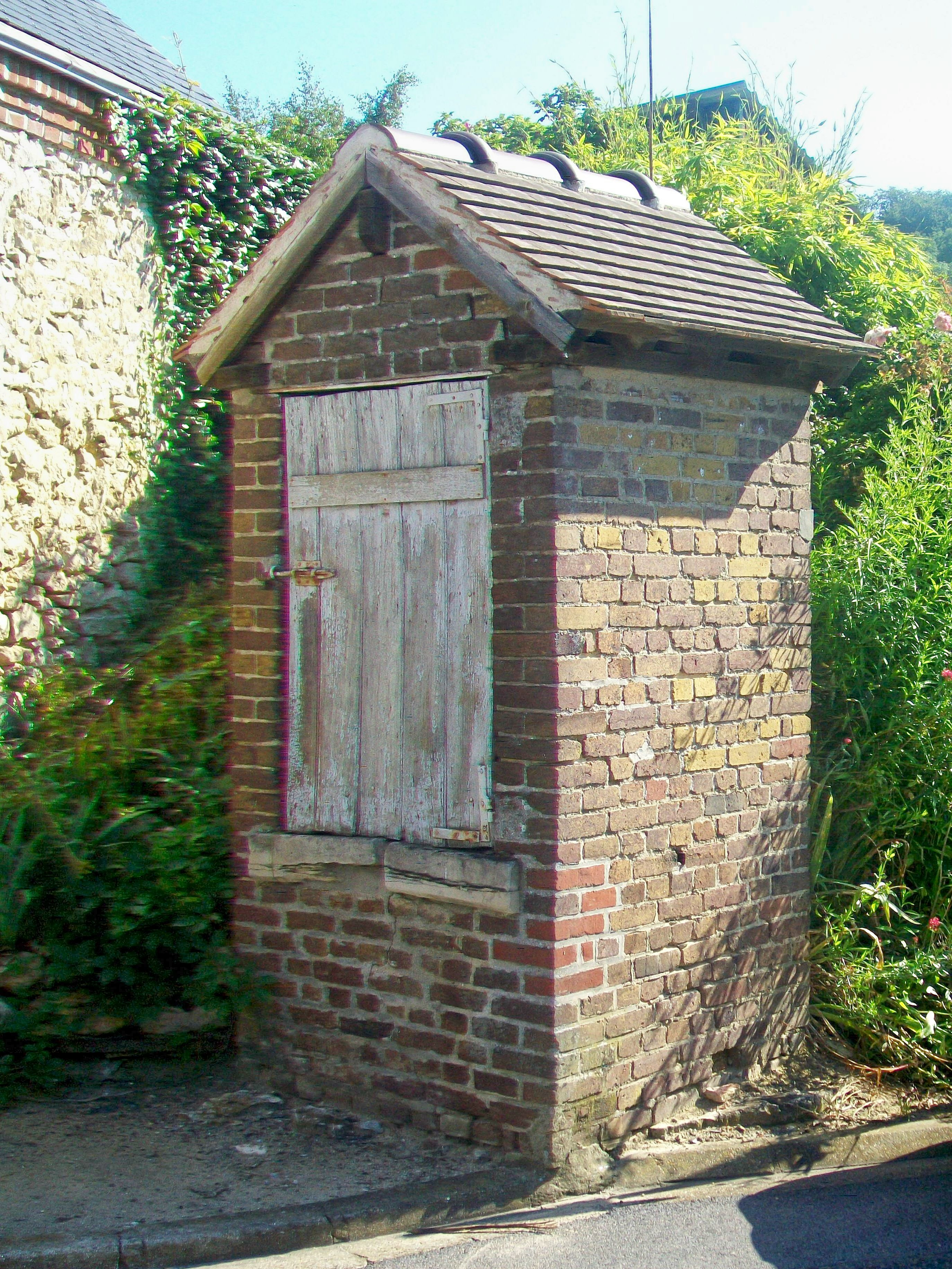 Vieux puits publique au carrefour rue du Pontceau / rue de l'Église.